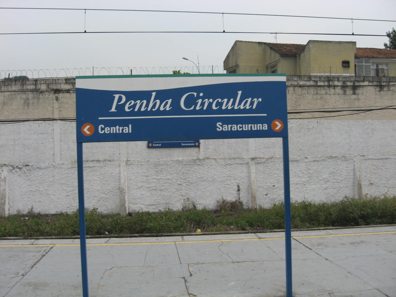 Estação ferroviária de Penha Circular, no Rio de Janeiro.